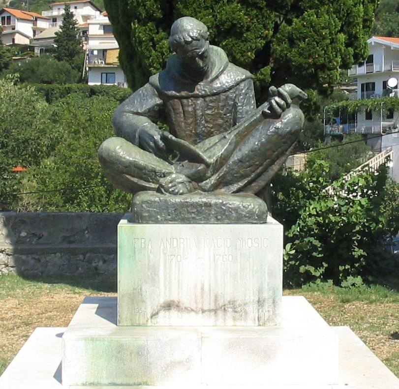 Denkmal für den kroatischen Dichter, Andrija Kačić Miošić, im Garten der Kirche von Brist, aufgenommen von Dr. Hagen Graebner am 24.08.2006